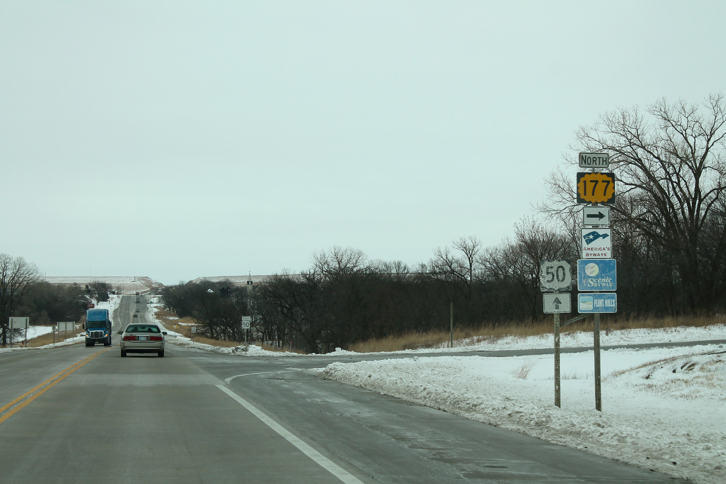 US50eRoad-KS177nSign